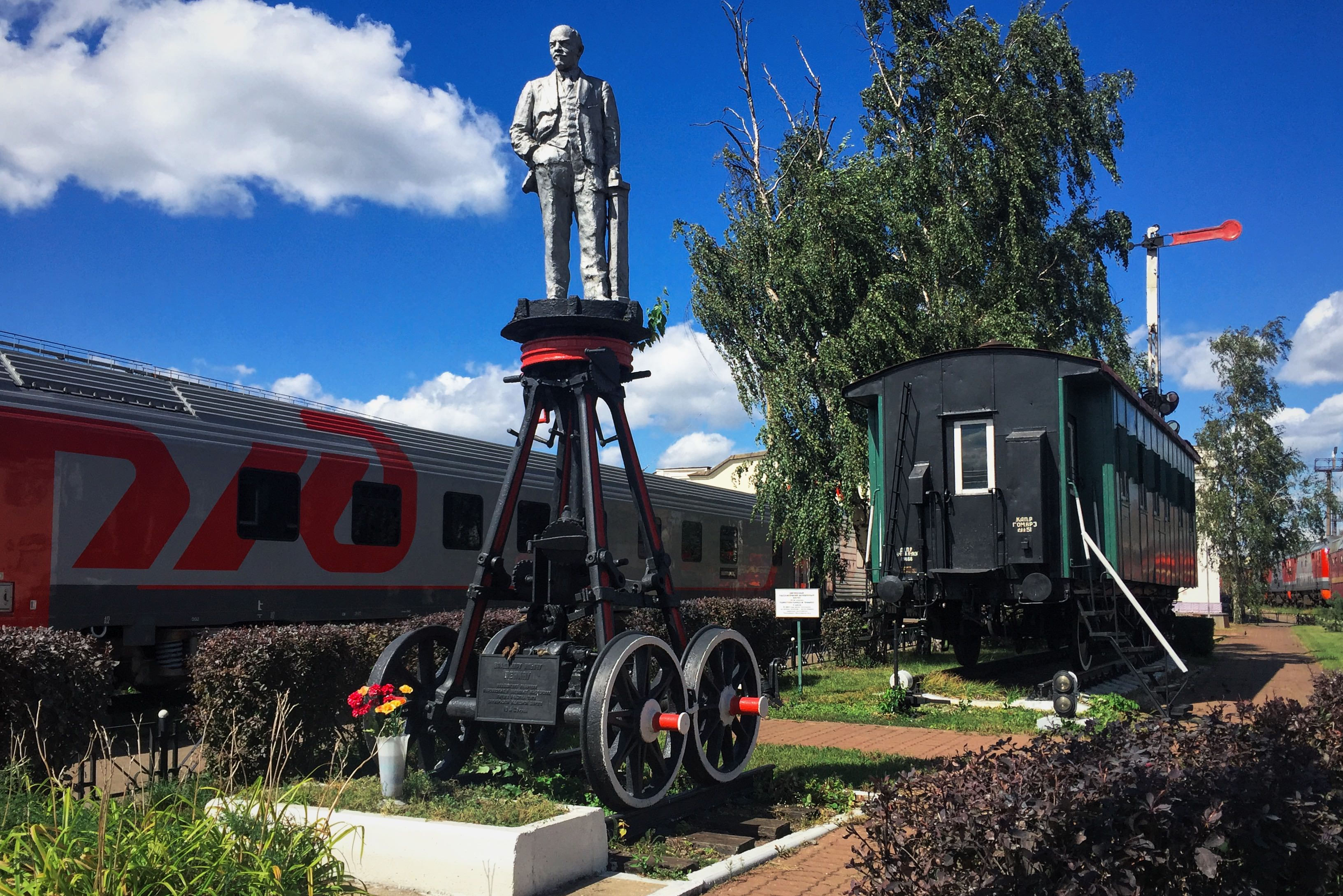 Проезд Комсомольской Площади. Памятник Владимиру Ленину на постаменте из паровозных деталей Moscow in 2016; Москва в 2016